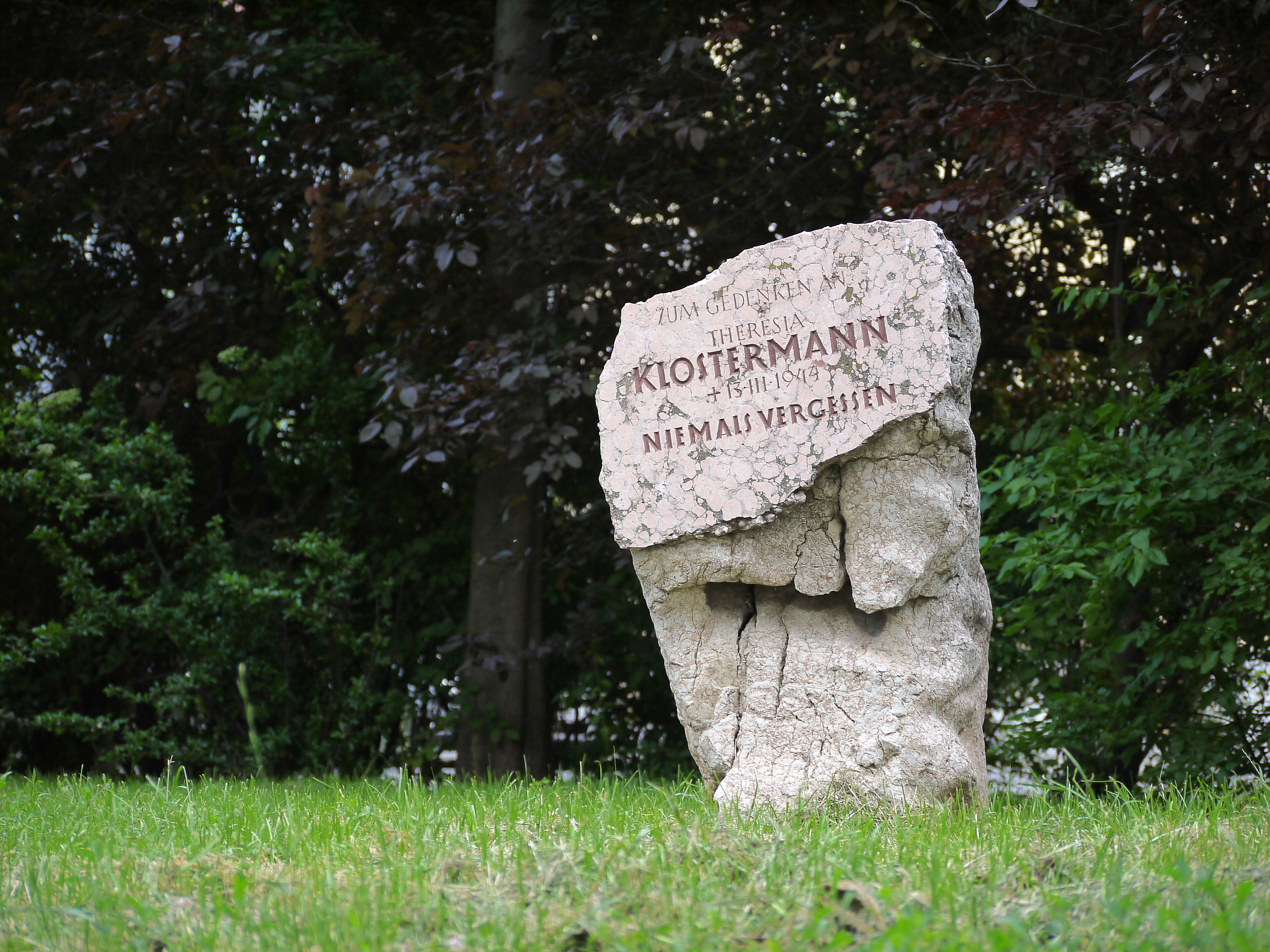 Klostermann Theresia (+13.3.1944), Widerstandskämpferin - Denkmal